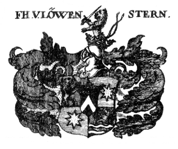 Wappen Freiherren von Löwenstern, Kupferstich